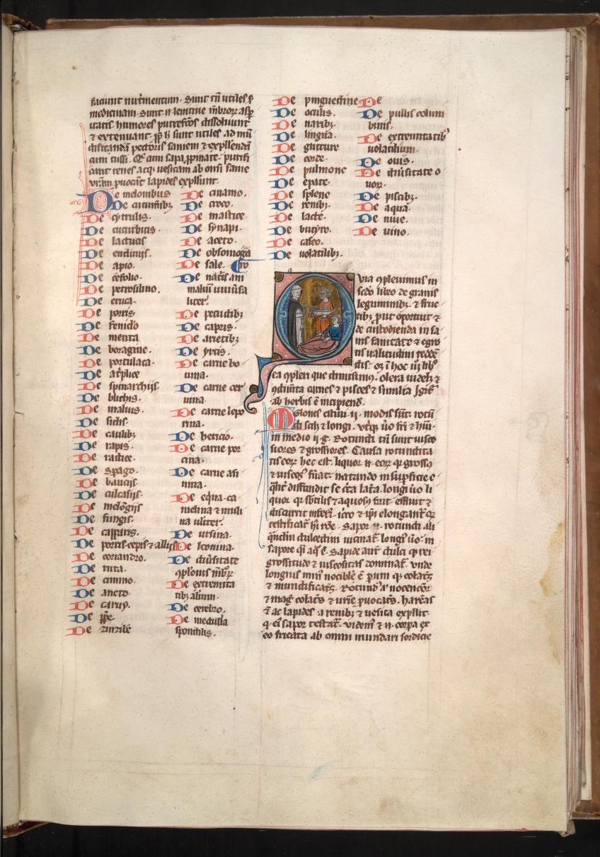 De dietis particularibus des Isaak ben Salomon Israeli in der lateinischen Übersetzung von Constantinus Africanus, Initiale: Dominikaner weist einen Diener an, der ein Tablett zu einem Patienten trägt, Schoenberg Collection, LJS 024, f. 65r, Paris (Mitte 13. Jahrhundert)